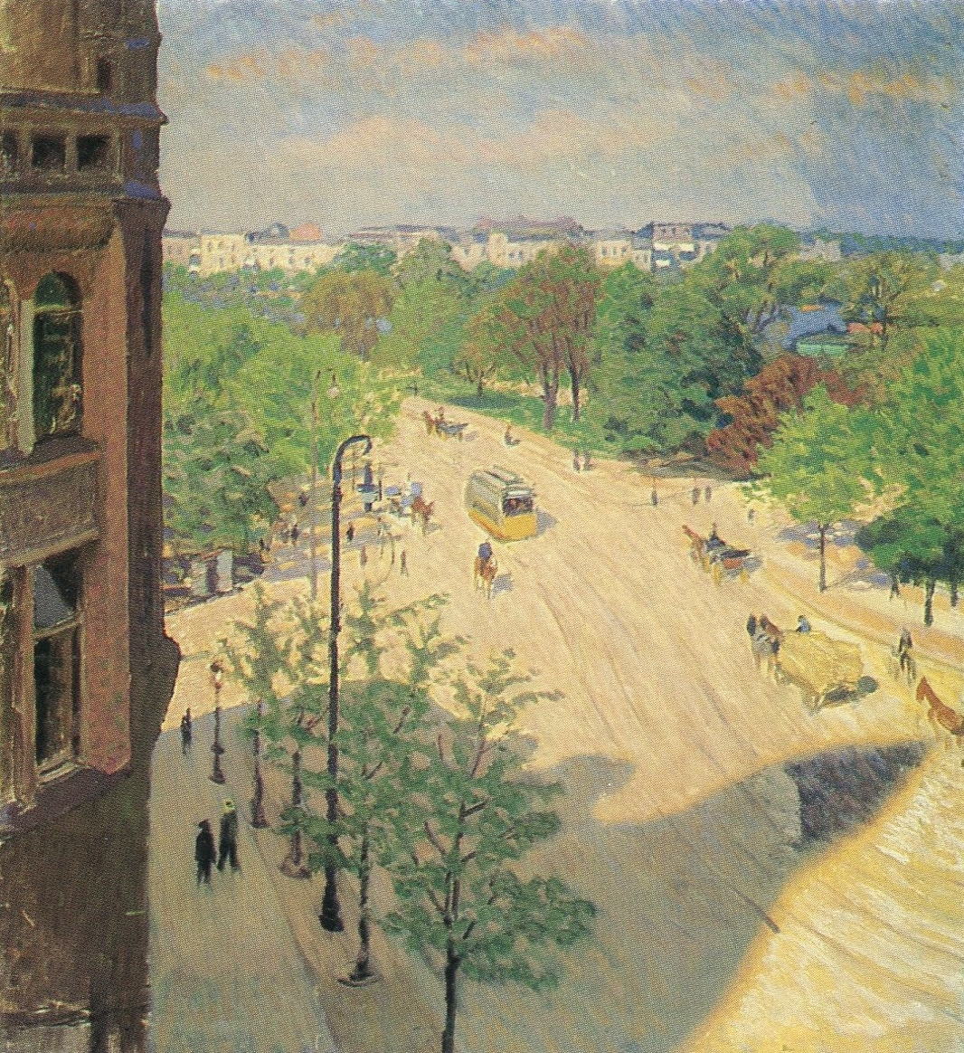 Blick aus dem Atelier der Malschule Koppel auf den Glockengießerwall in Hamburg